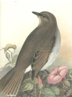 Kamao Myadestes myadestinus